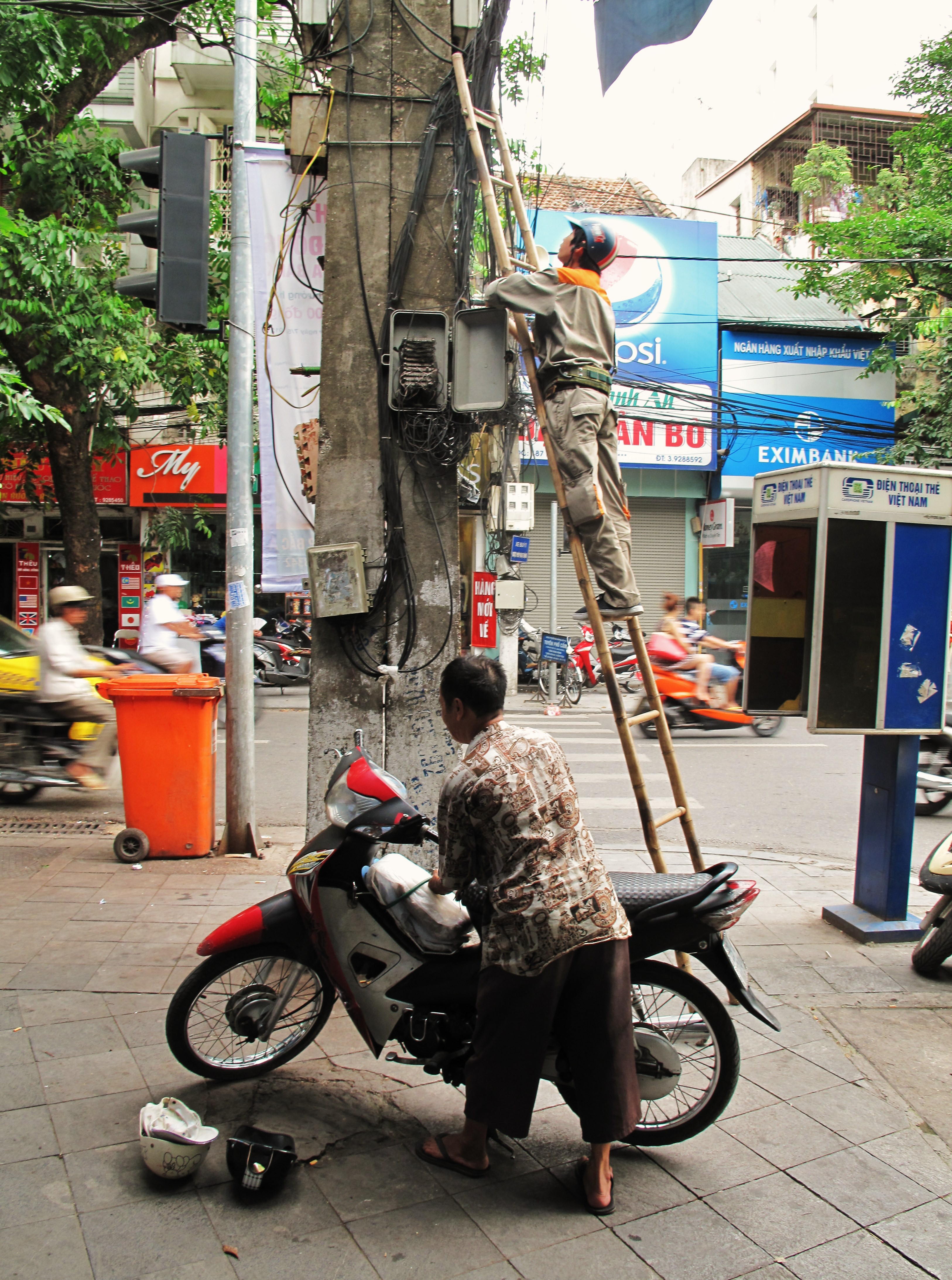 Electrician